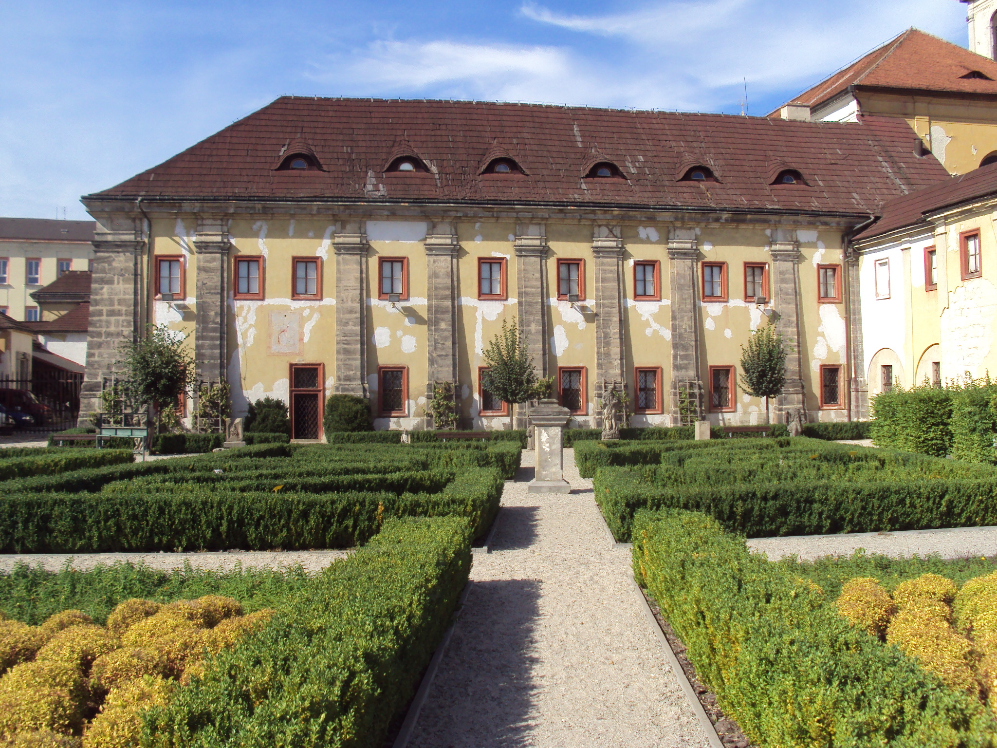 Klášterní komplex od zahrady, tato část je muzea